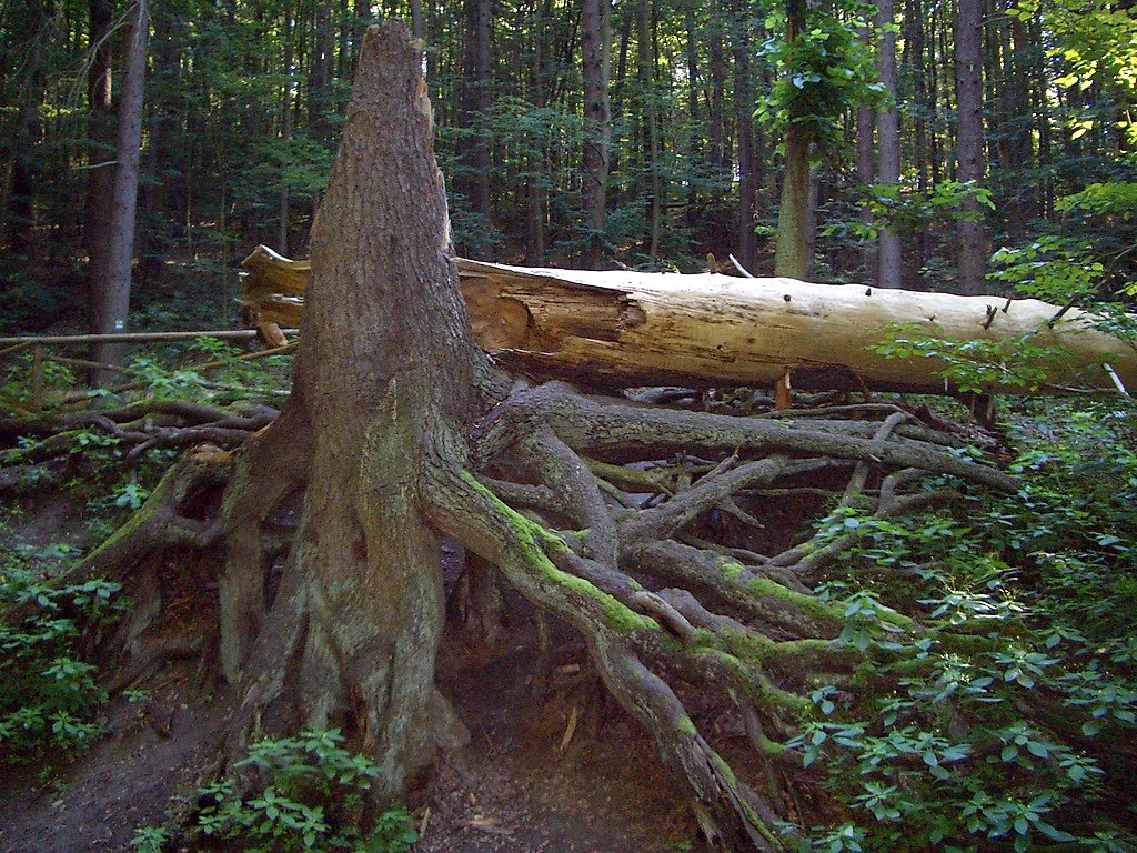 Das Naturdenkmal Wurzelfichte, eine ehemals 35 m hohe Fichte im Naturpark Märkische Schweiz.